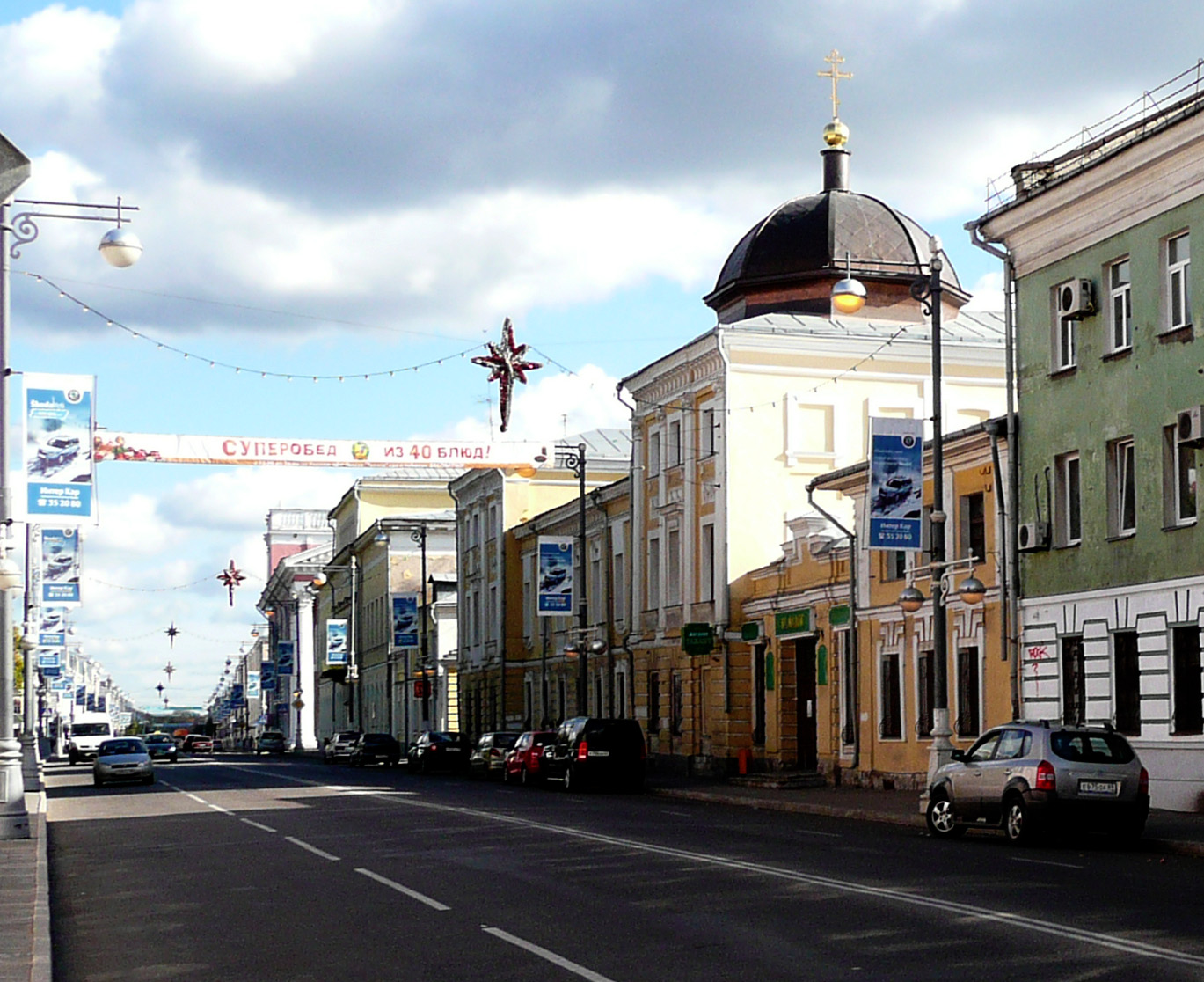 Епархиальное управление в Твери (Архиерейский дом)